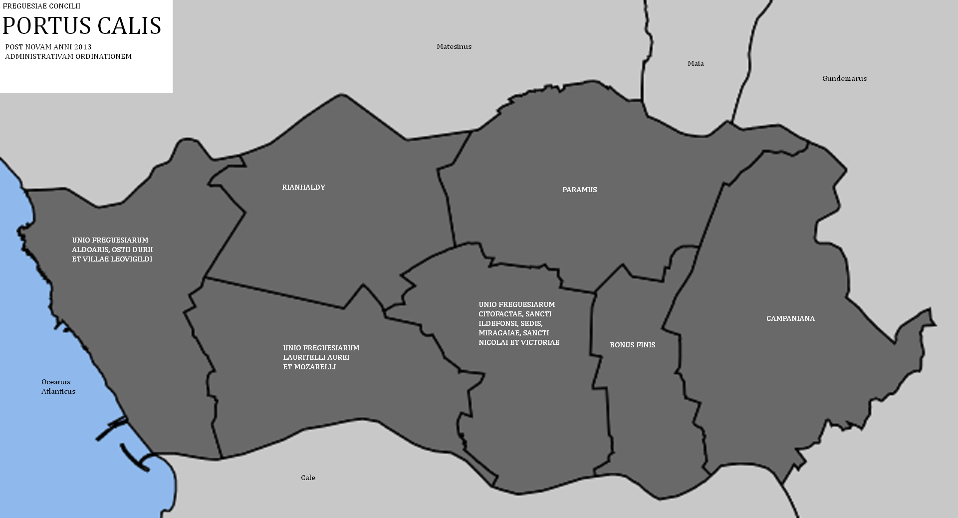 Concilii Portus Calis freguesiae post novam anni 2013 ordinationem administrativam